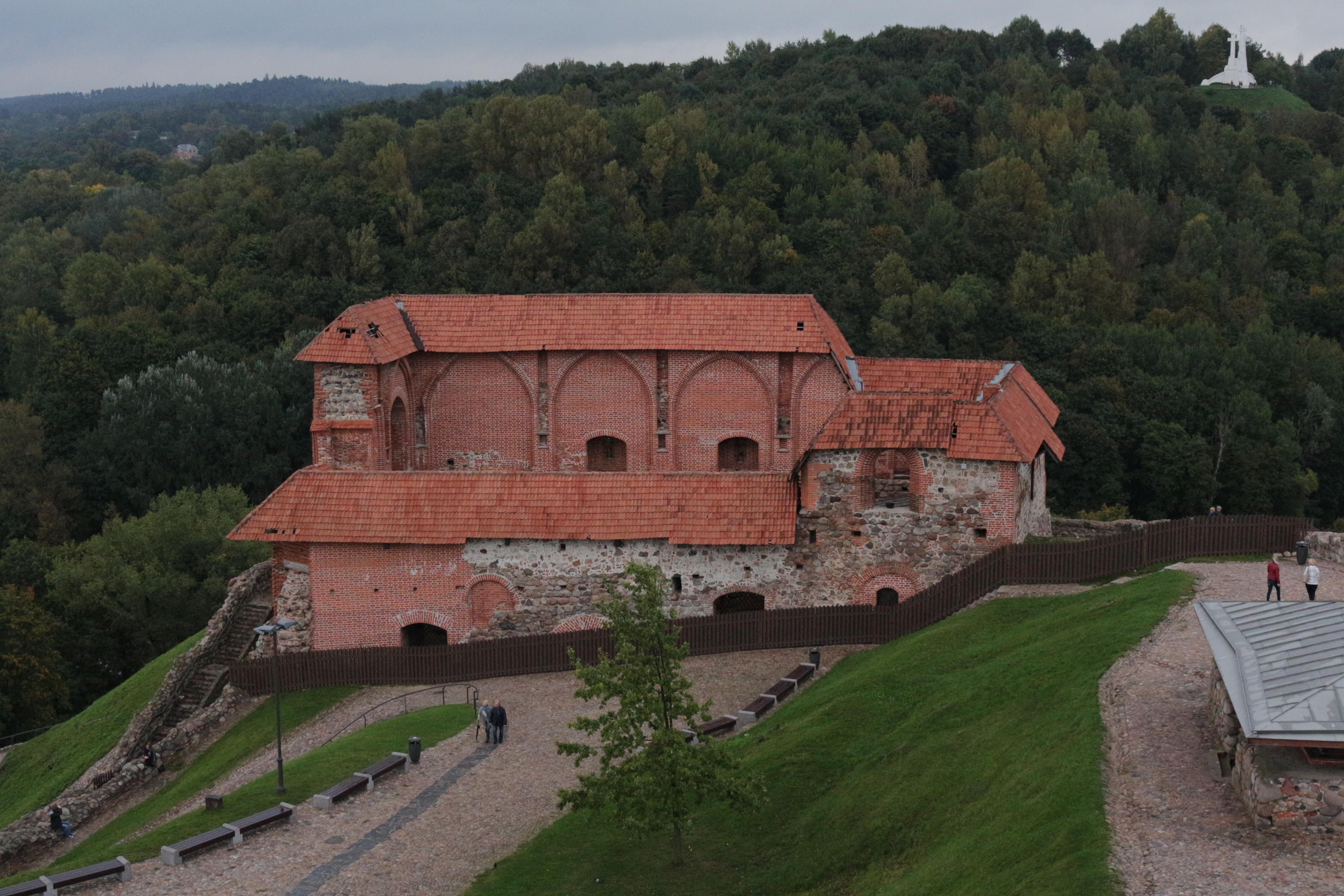 Верхній замок у Вільнюсі, Литва. Реконструйований графський палац.